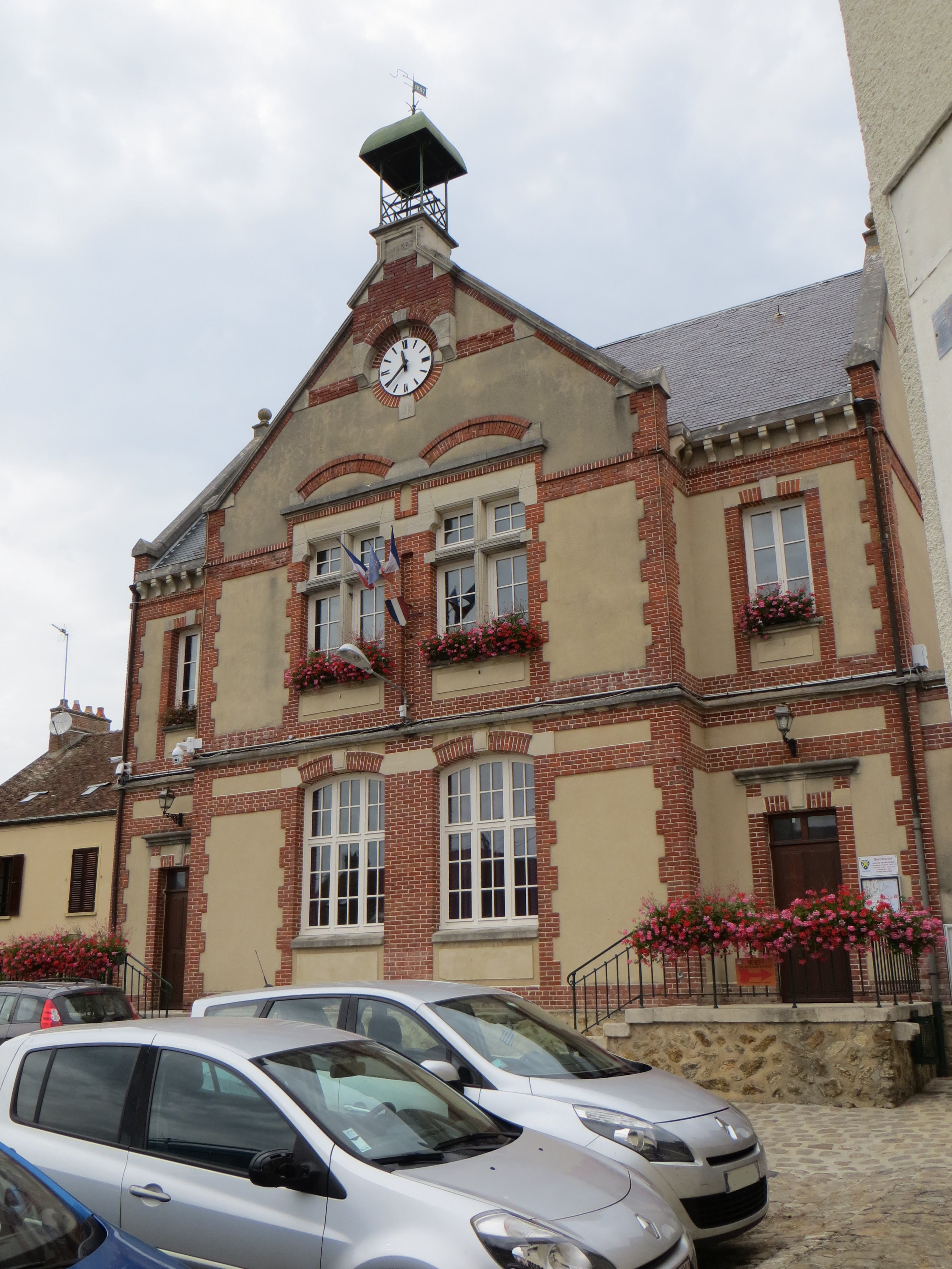 Mairie de Touquin (1887)